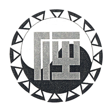 장흥임씨 휘장